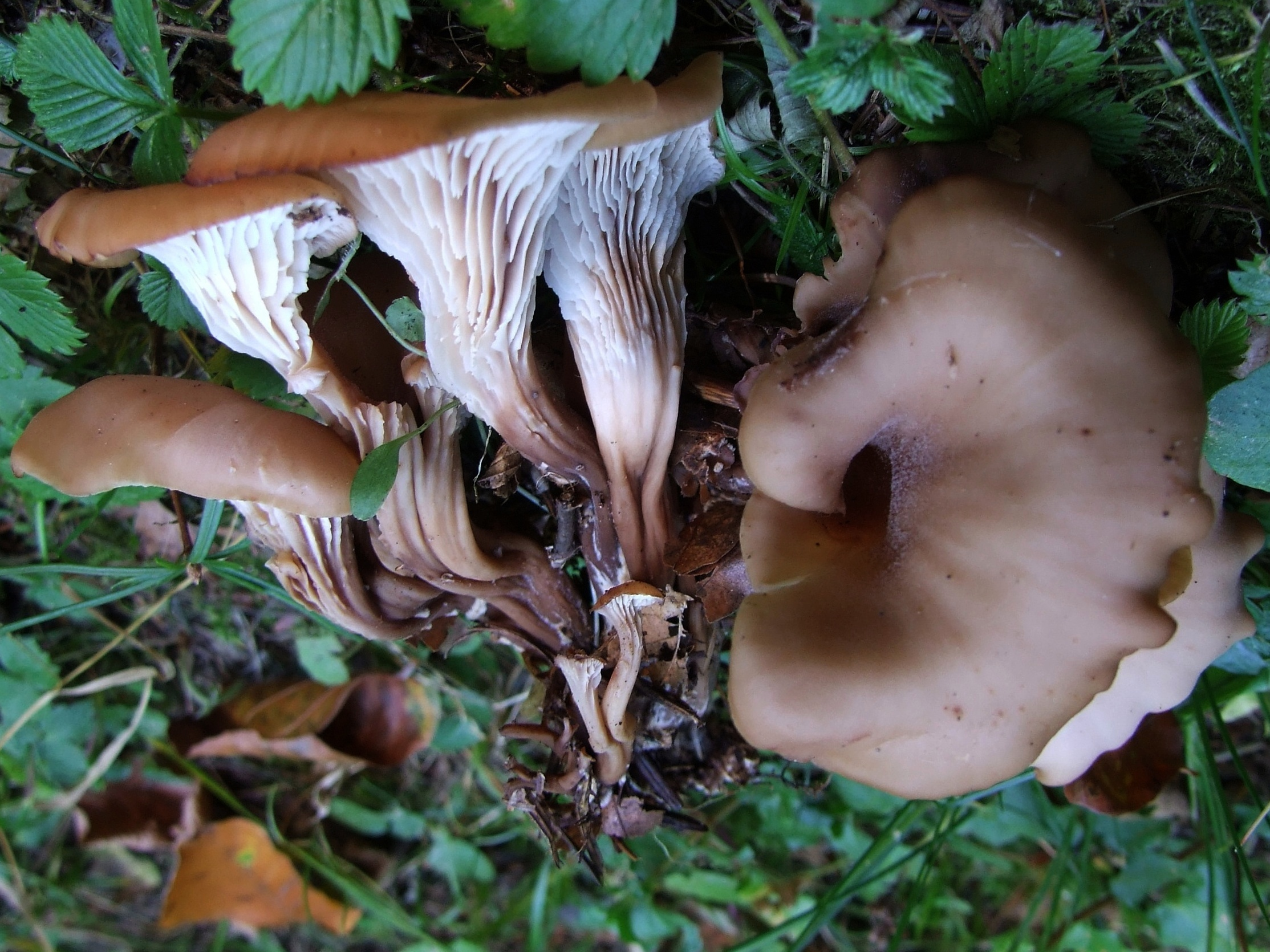 Lentinellus cochleatus